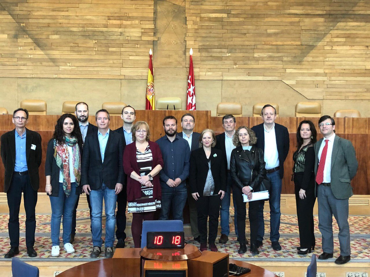 Avanza el consenso para modificar la ley de Cañada Real Con la firma del acuerdo para modificar la Ley 2/2011 de la Cañada Real Galiana eliminando su condición de vía pecuaria Los terrenos pasan a ser bienes patrimoniales de la Comunidad de Madrid, quien podrá cederlos a los ayuntamientos o a aquellos ocupantes que puedan acreditar fehacientemente que han residido en dichos terrenos de forma previa a 2011 La enajenación de los terrenos no puede suponer en ningún caso la legalización de las construcciones o actividades desarrolladas en los mismos 26/03/2019 El delegado de Desarrollo Urbano Sostenible del Ayuntamiento de Madrid, José Manuel Calvo, ha firmado un acuerdo para avanzar en la ordenación urbanística y medioambiental de la zona de la Cañada Real Galiana. Se trata de la modificación de la Ley 2/2011 de la Cañada Real Galiana para desafectar íntegramente el tramo de 14,2 kilómetros, que discurre por los municipios de Coslada, Rivas-Vaciamadrid y Madrid, por no ser adecuado al tránsito ganadero ni a los usos alternativos previstos en la legislación básica.